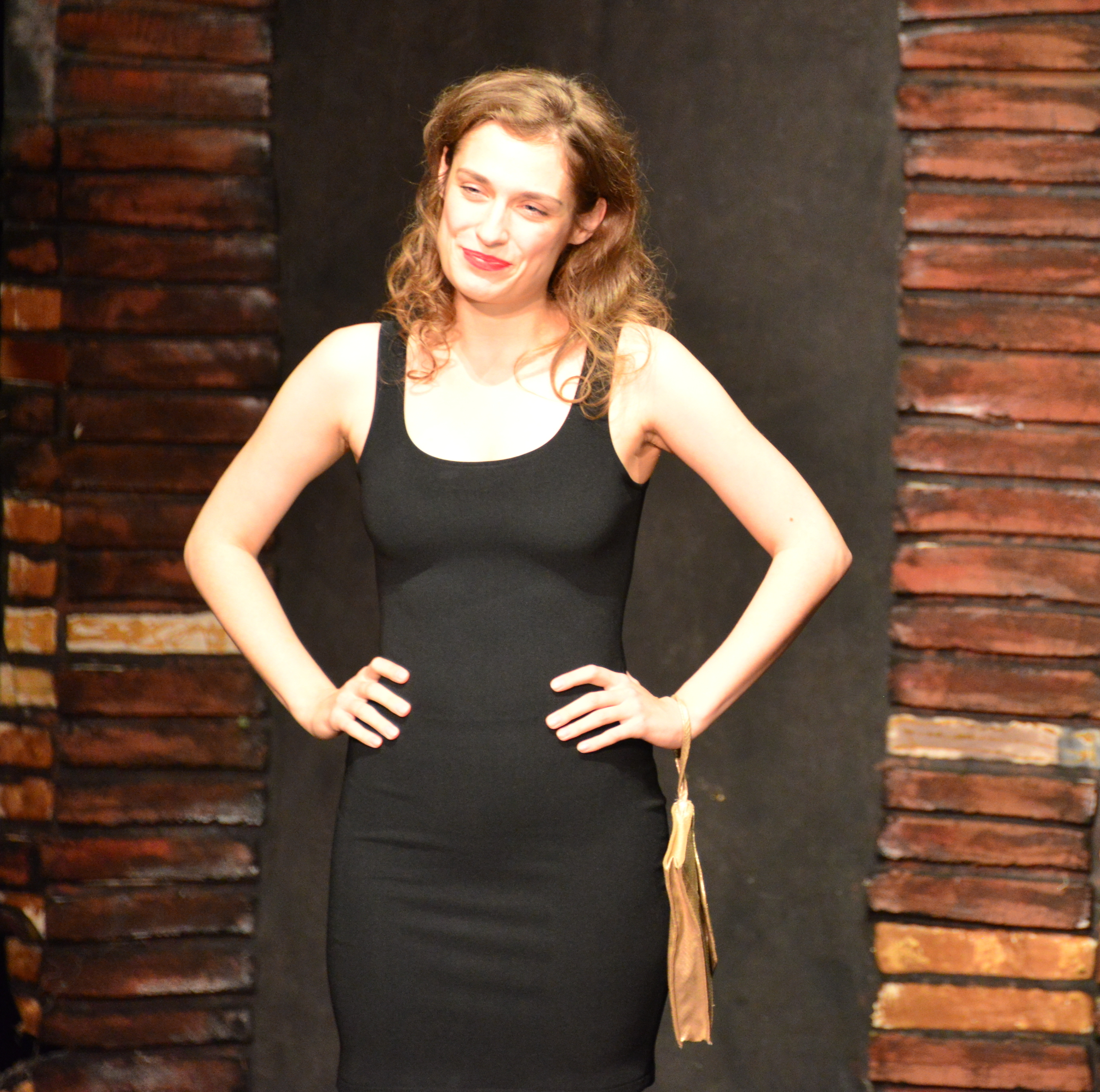 Спектакль «Роман о девочках» на сцене театра «У Никитских ворот» 08.10.2017